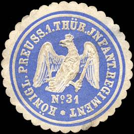 Sealing stamp Title: Königlich Preussische 1. Thüringische Infanterie Regiment No. 31 Description: blau, weiß, geprägt Place: Altona size: 3 cm